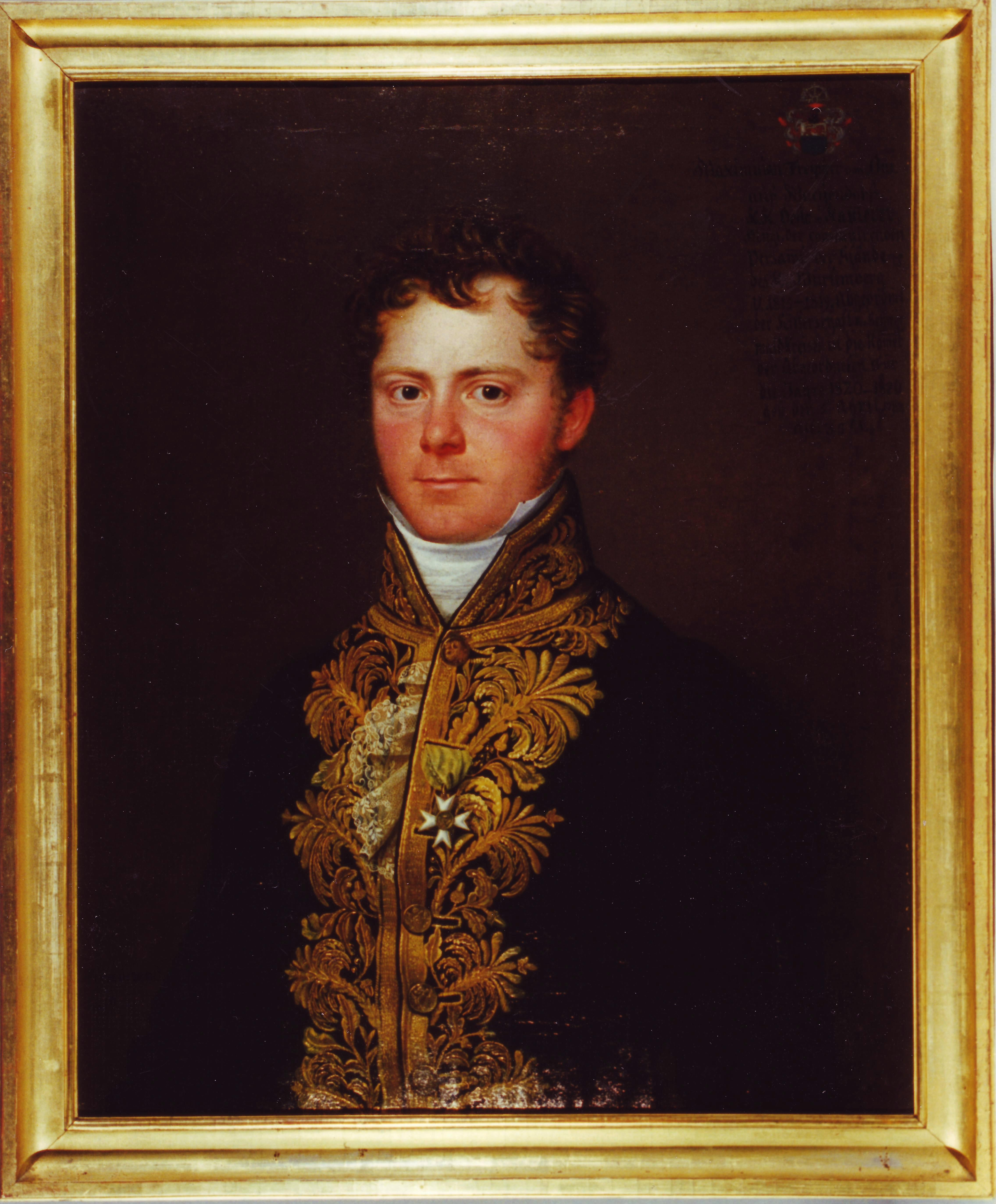 Ölgemälde von Maximilian von Ow